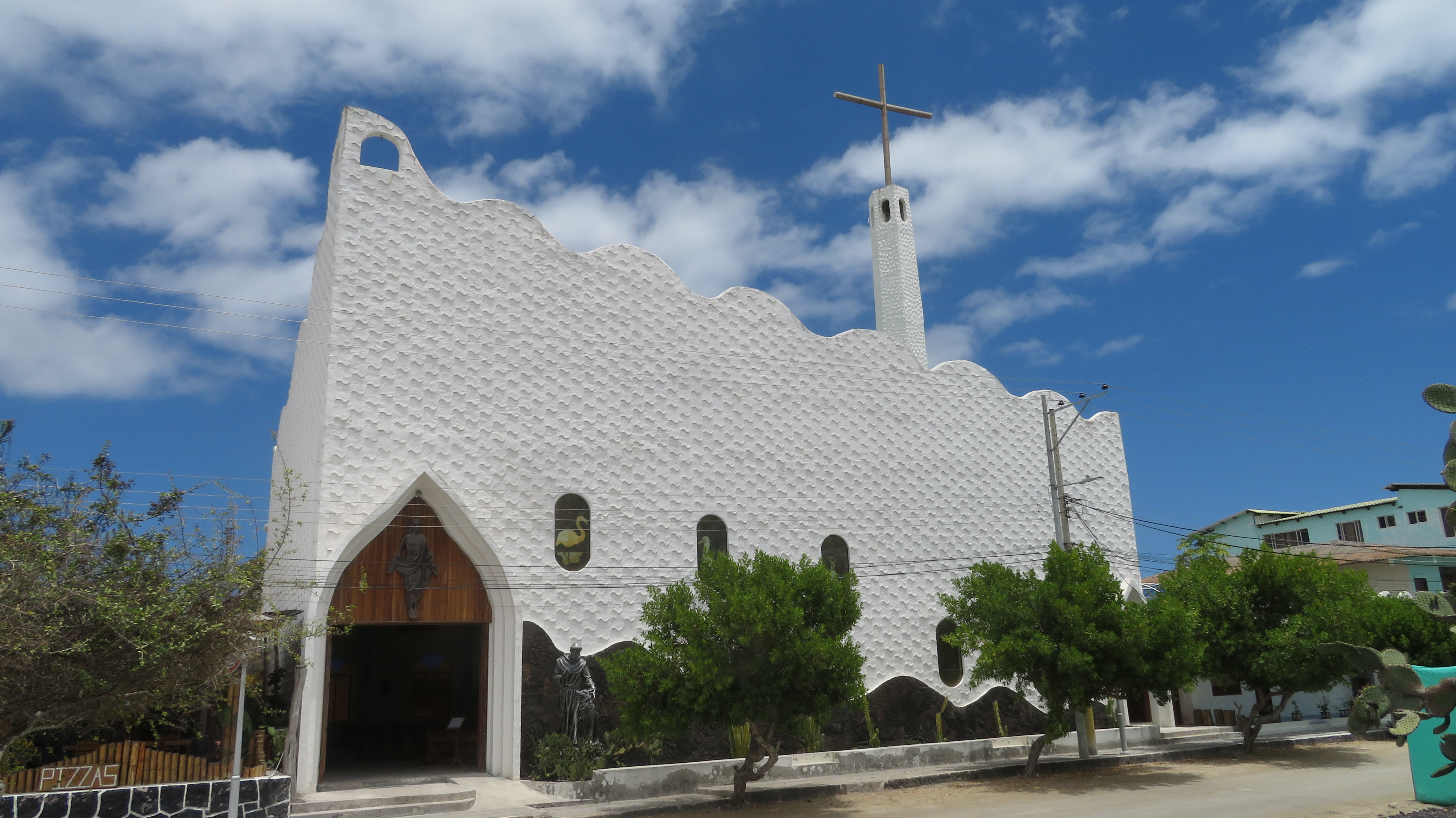 Iglesia Cristo Salvador, Puerto Villamil, Isla Isabela, Islas Galápagos, Ecuador